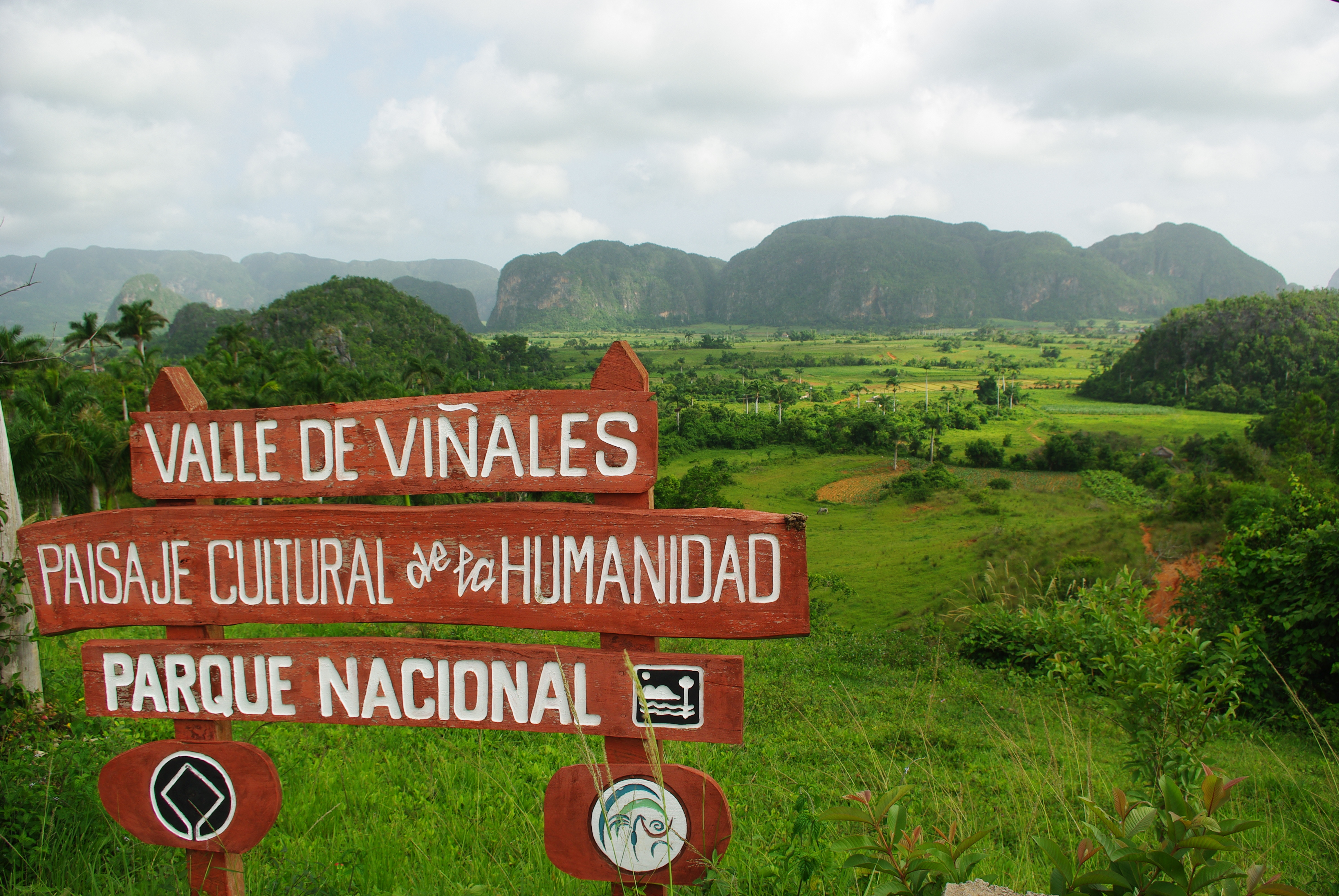 Valle de Viñales, Pinar del Río, Cuba.